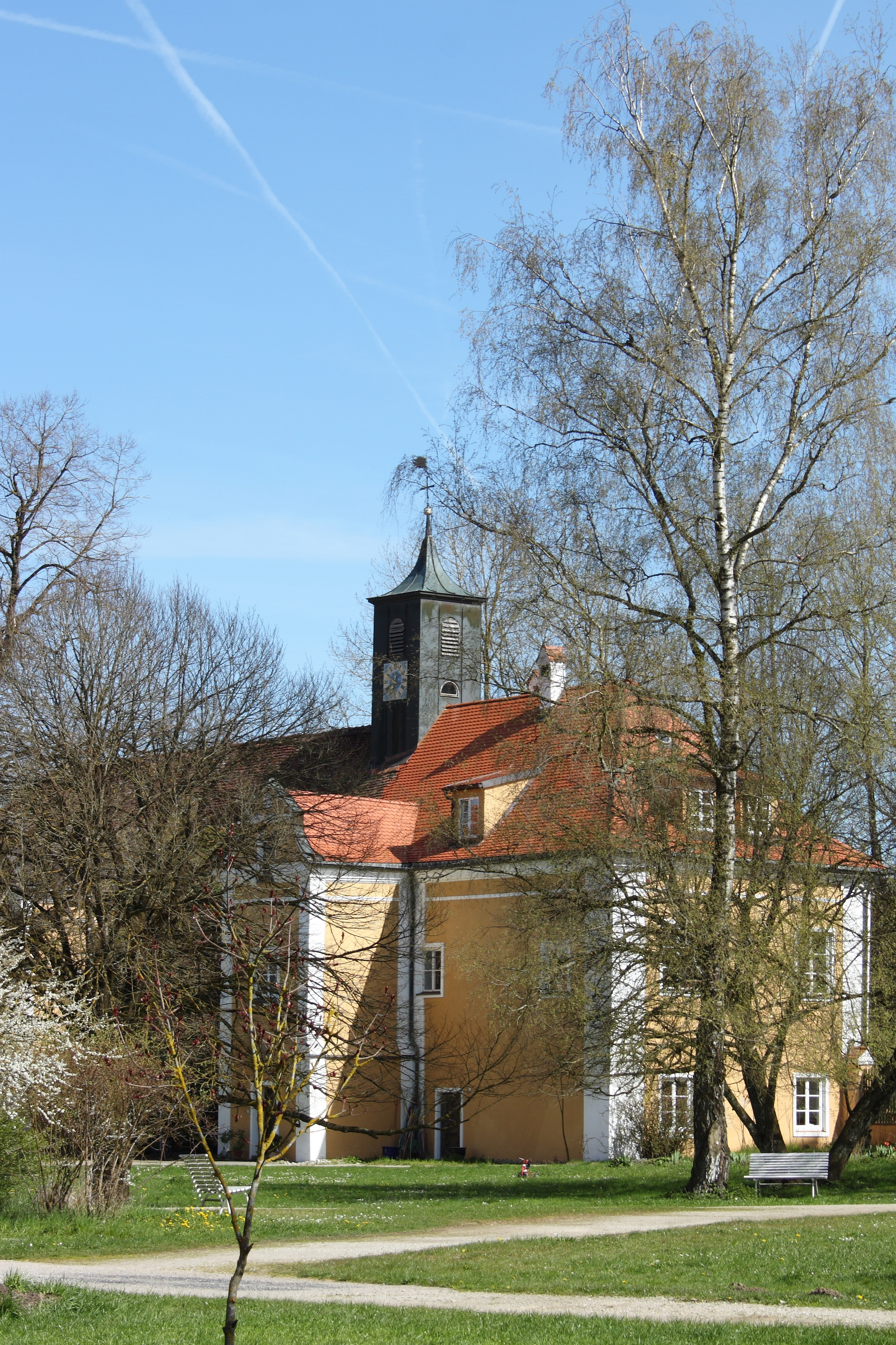 Ehemaliges Deutschordensschloss, Schloss Blumenthal, in Klingen, einem Stadtteil von Aichach im Landkreis Aichach-Friedberg (Bayern), ehemalige Schlosskapelle, katholische Filialkirche St. Maria